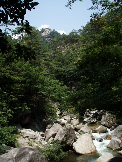 御岳昇仙峡（大仏岩）